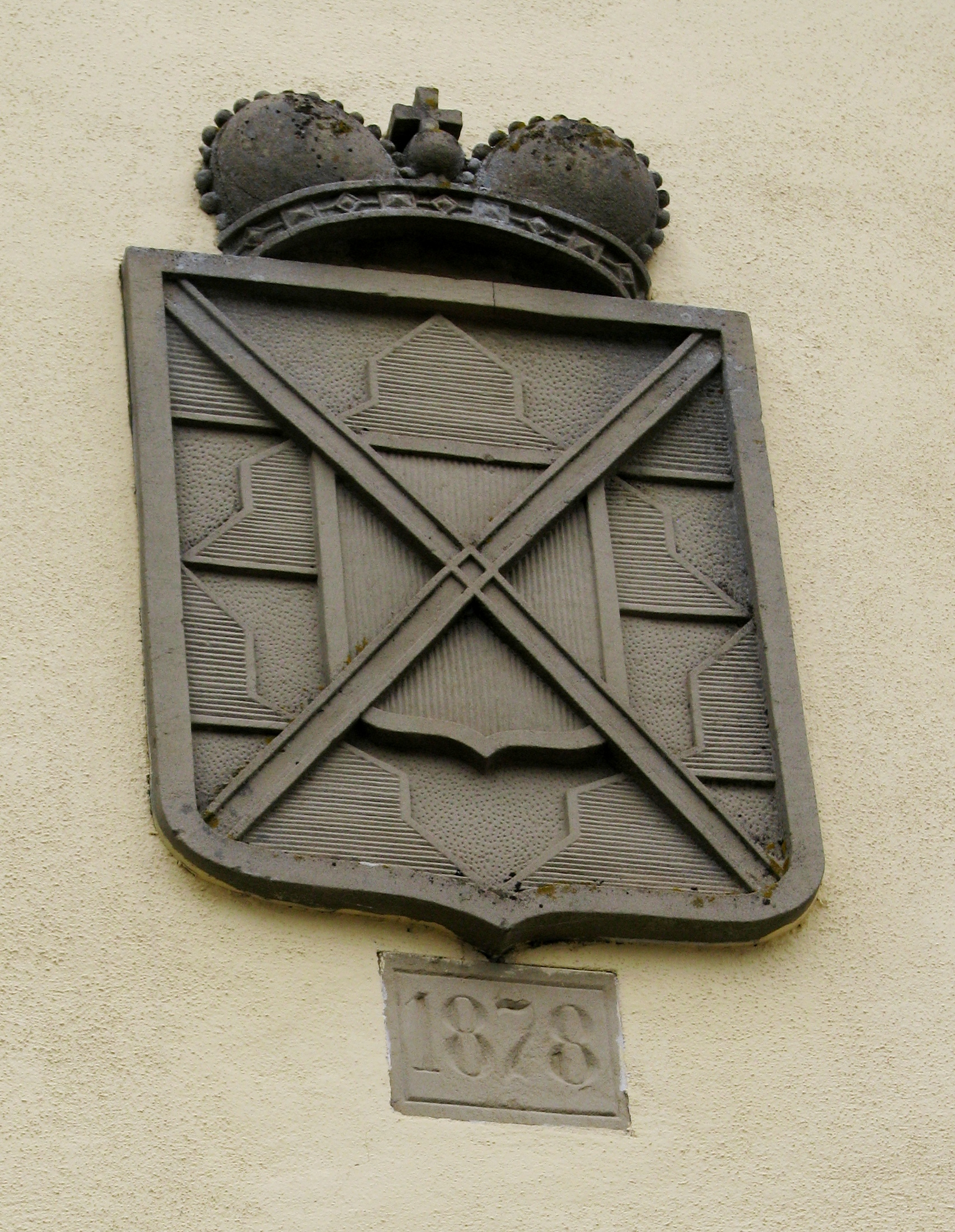 Kreuth (Schloßkreuth), Ortsteil von Heideck im mittelfränkischen Landkreis Roth, Oettingsches Wappen am Torbau